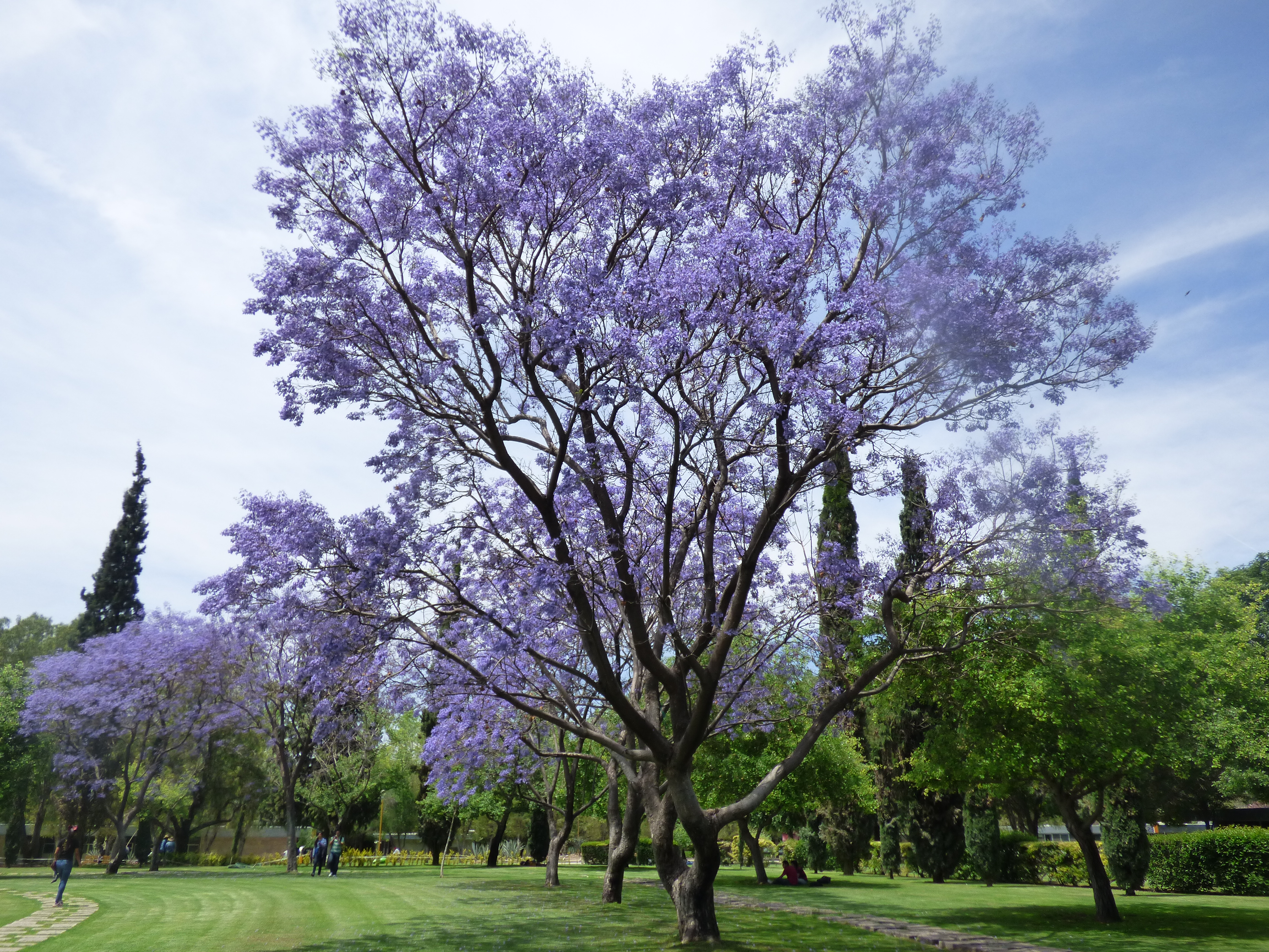 Jacarandas en la Universidad Autónoma de Aguascalientes